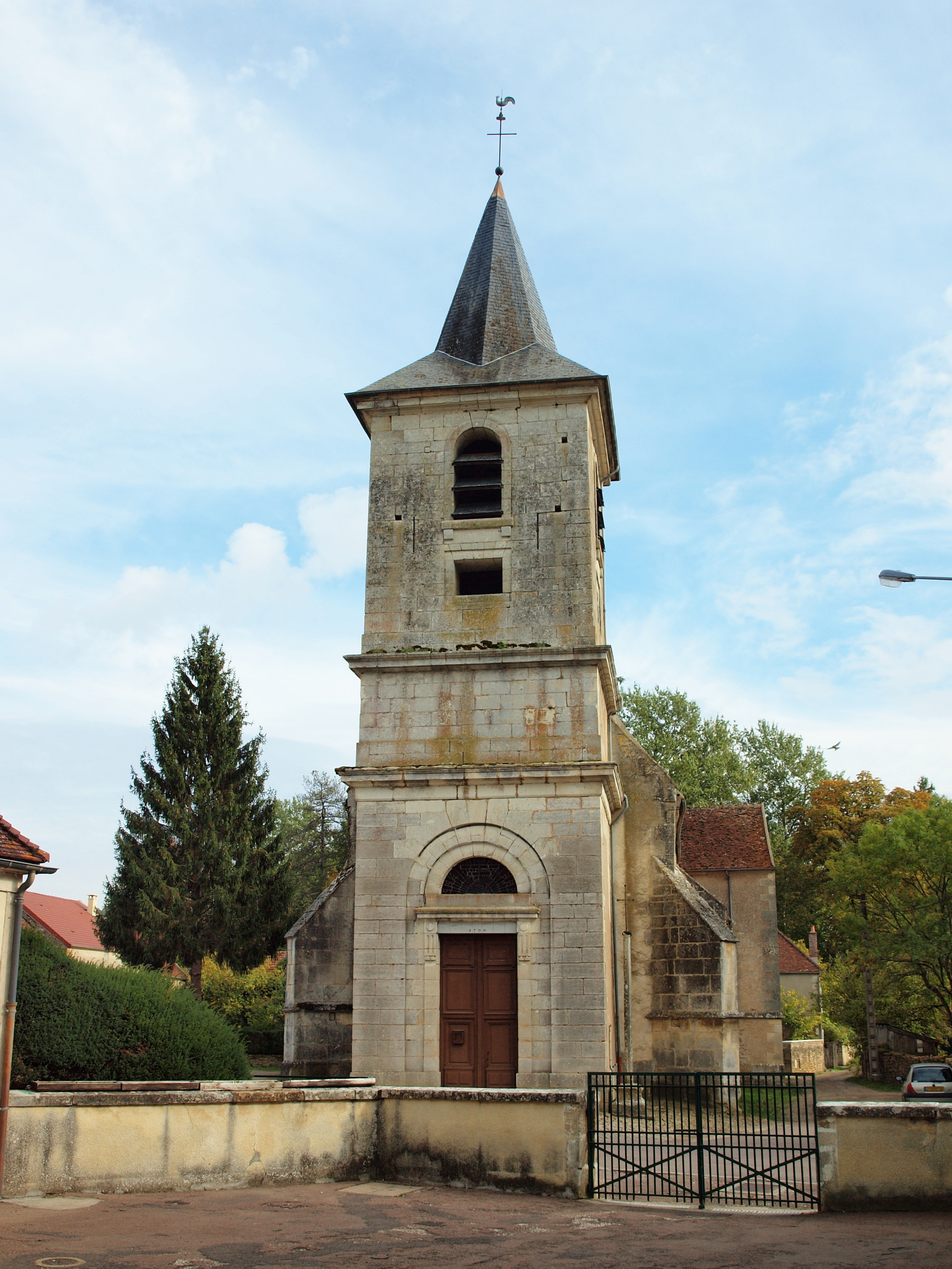 Oisy (Nièvre, France)